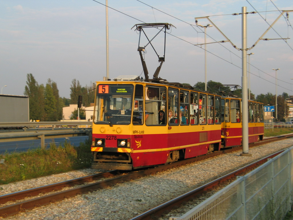 Tramwaj typu 805Na, Aleksandrowska Street